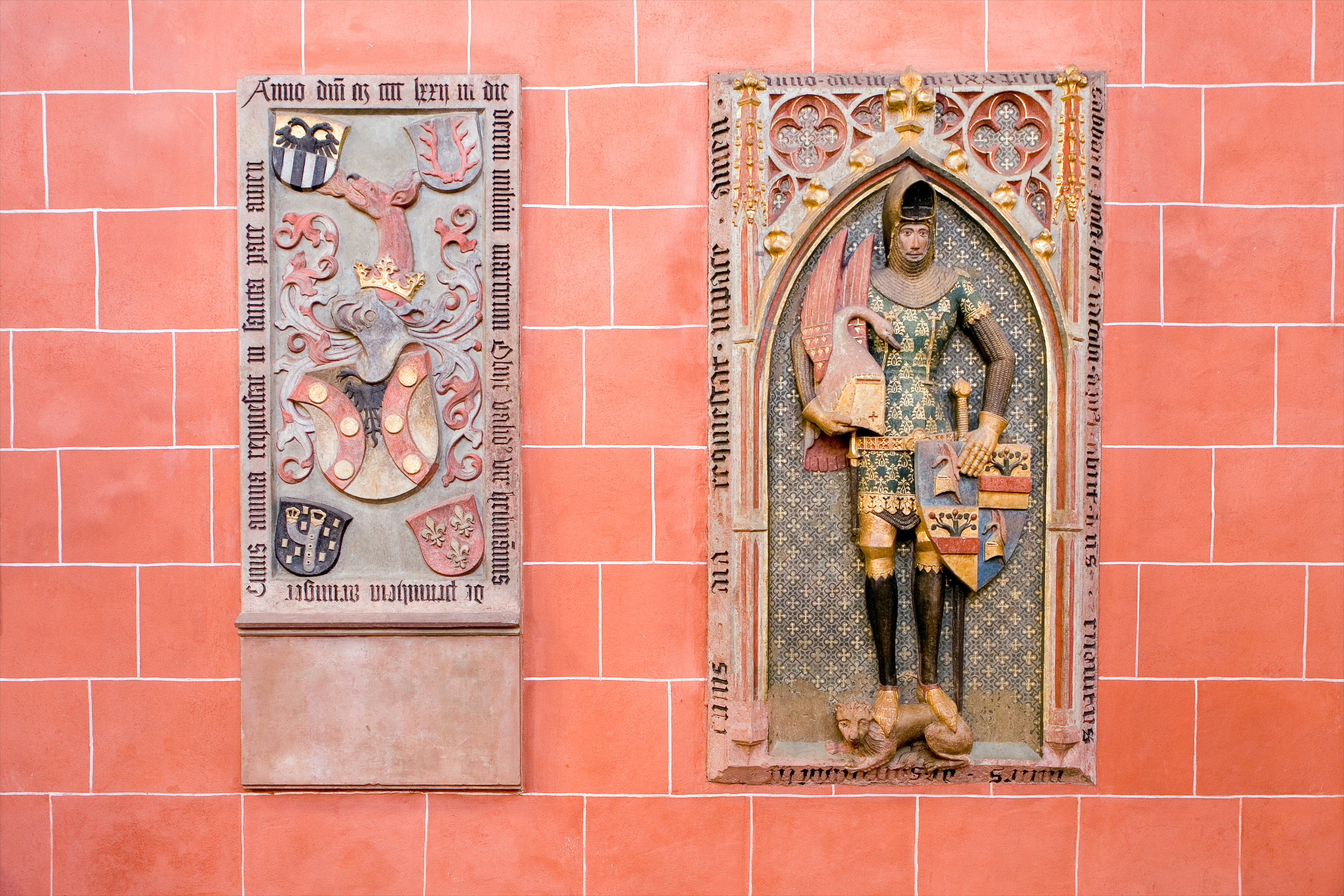 Gotische Grabplatten im Nordquerhaus des Kaiserdoms St. Bartholomäus in Frankfurt am Main. Selber fotografiert im Februar 2008, Doppellizensierung GFDL & CC-BY-SA 2.5. Reshot version of the original Image:Mk Frankfurt Dom Grabplatten.jpg uploaded by User:Magadan.